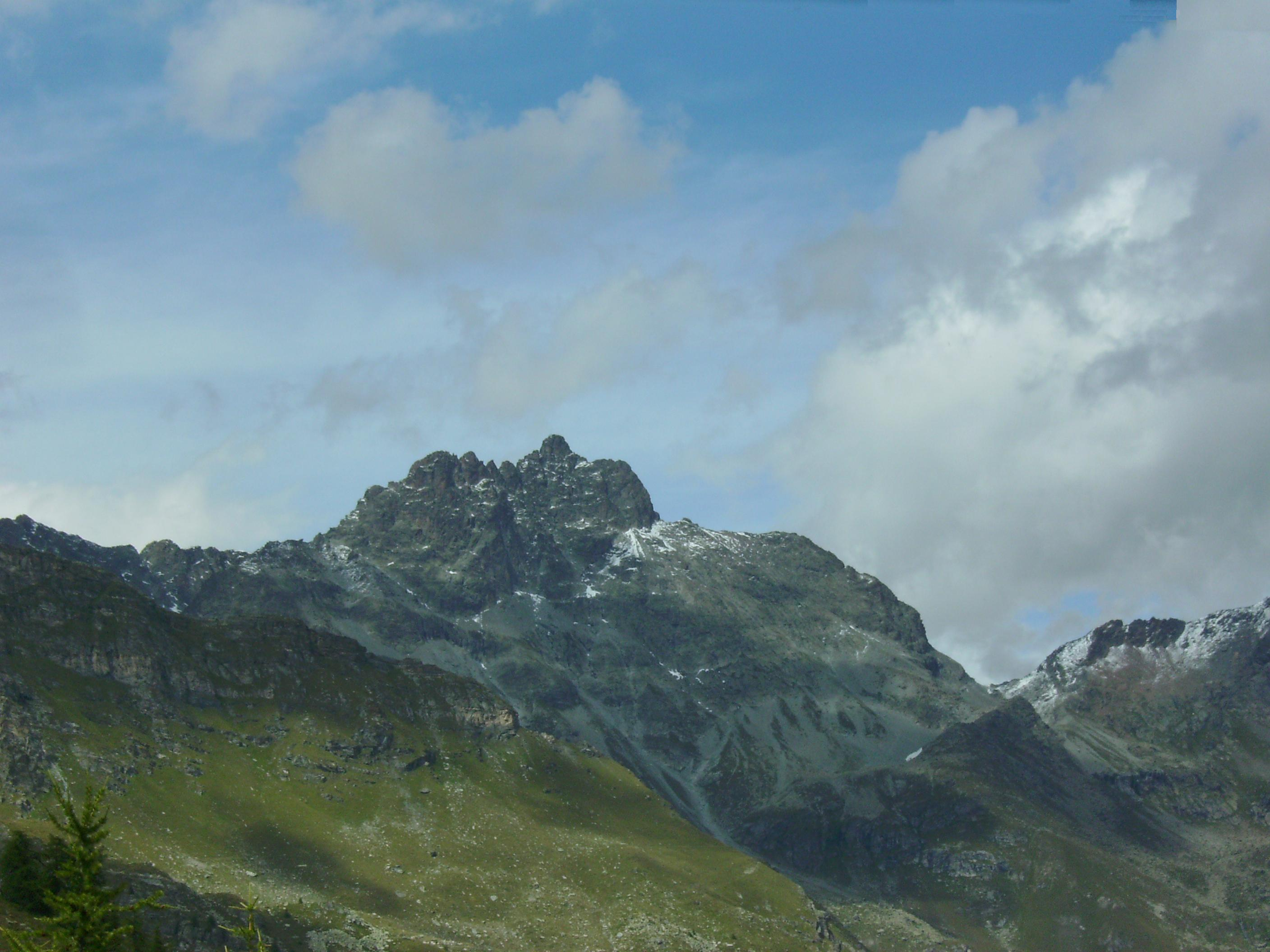 La punta Cian vista da sud